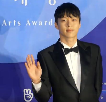 5월 1일 오후 서울시 강남구 삼성동 코엑스에서 제 55회 백상예술대상 시상식 레드카펫 행사가 열렸다.